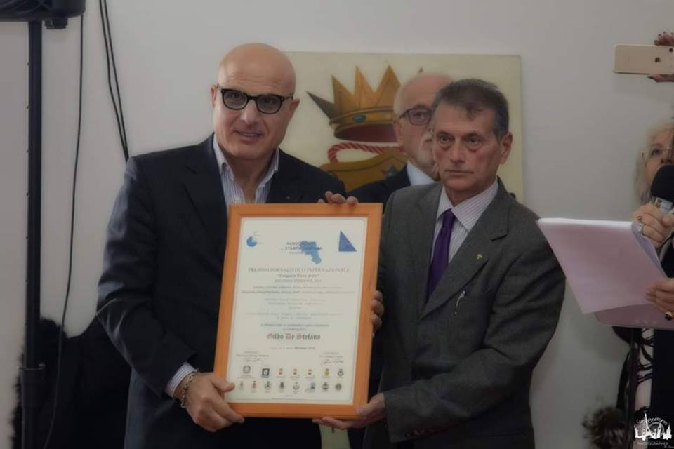 L'autore mentre riceve il Premio Giornalistico Internazionale Campania Felix dal Presidente della Giuria